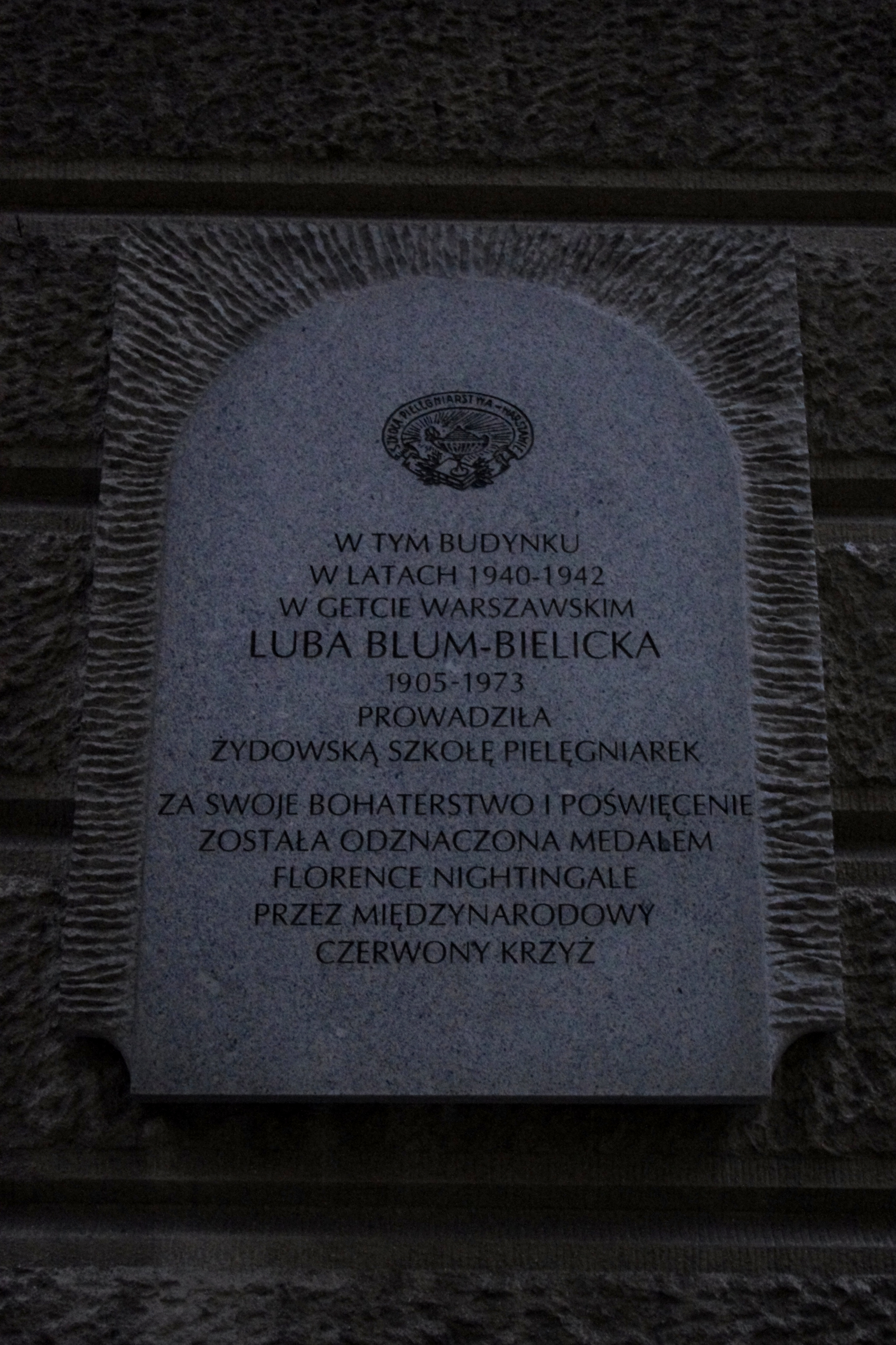 Tablica upamiętniająca Lubę Blum-Bielicką na ul. Mariańskiej 1 w Warszawie, na kamienicy Ubezpieczalni Społecznej (Kamienica Kasy Chorych) .